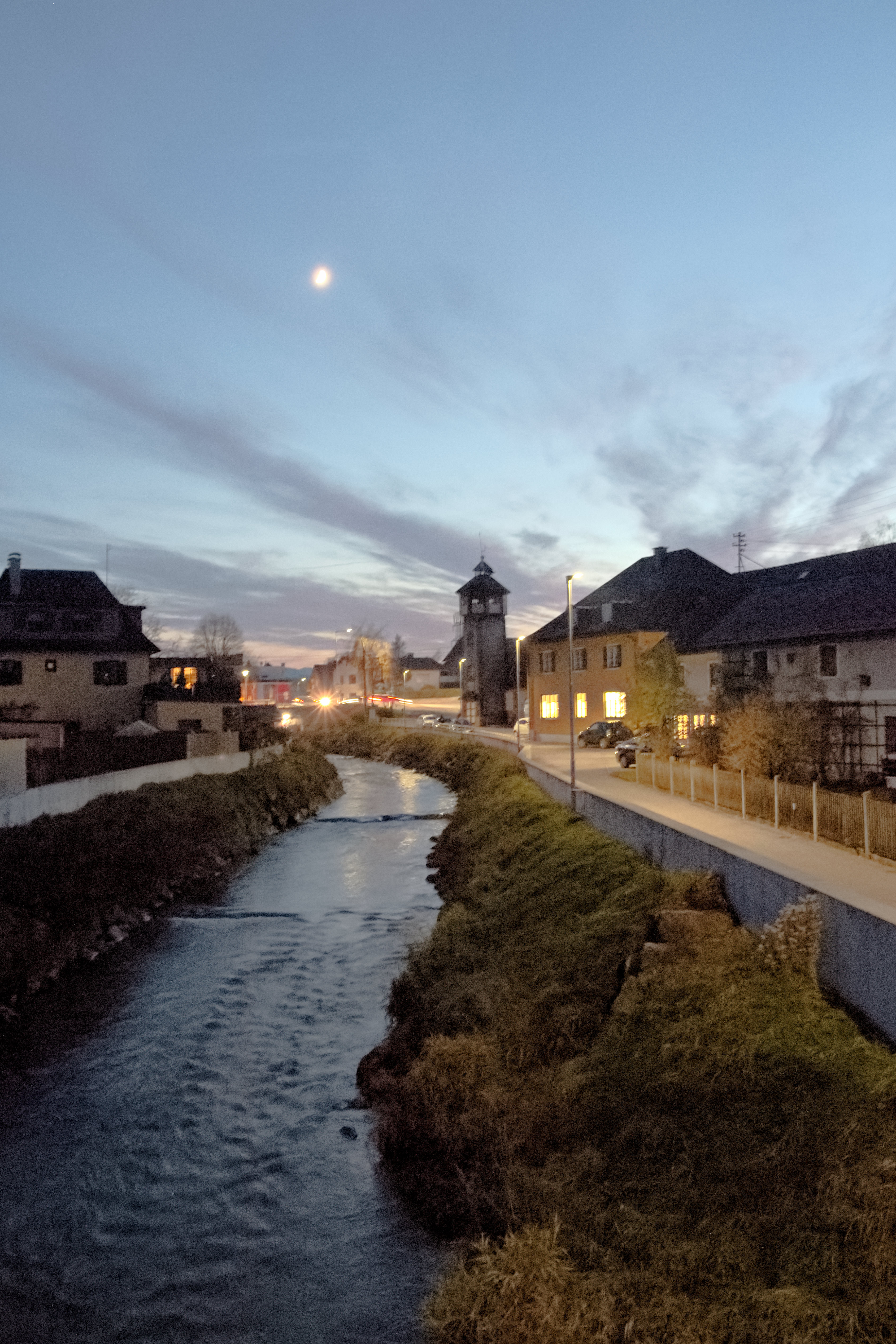 Die Dürre Ager im Zentrum von Timelkam (Bezirk Vöcklabruck) abends; rechts im Hintergrund das Feuerwehrhaus (Zeitangabe in EXIF-Daten falsch: dort fälschlicherweise Sommerzeit angegeben)